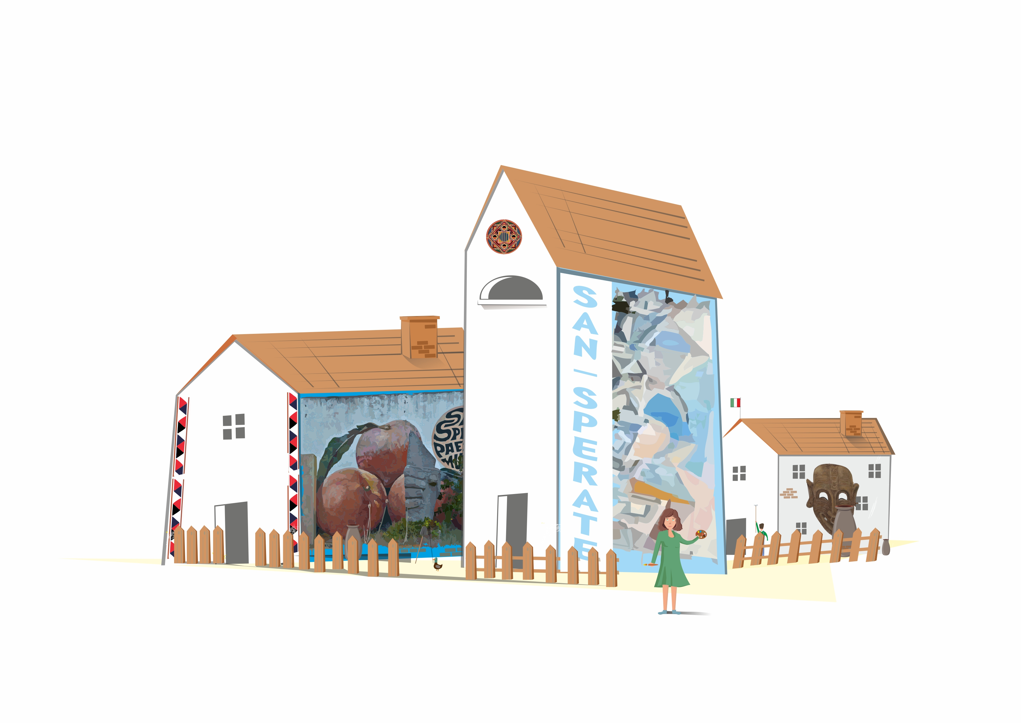 Сан-Сперато до 1968 год (иллюстрация)